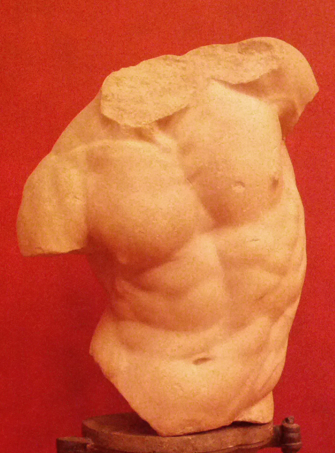 Torso gaddi